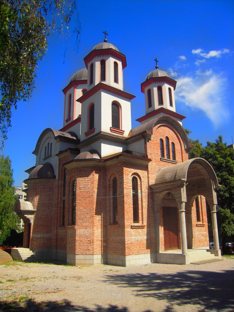 Hram_Uspenja_presvete_Bogorodice_u_Banjoj_Luci